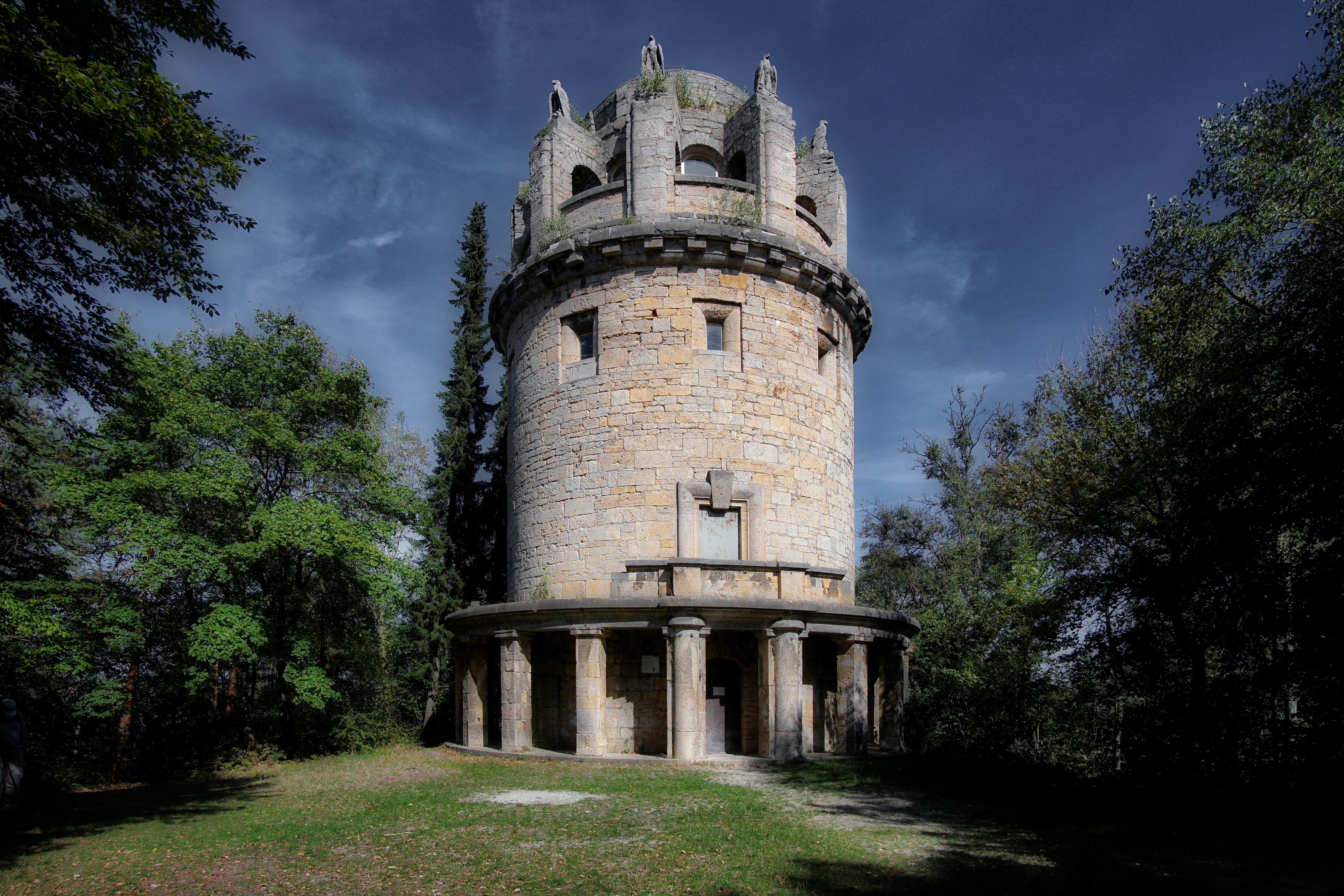 Bismarckturm auf der Tatzend bei Jena